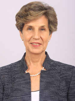 Isabel Allende Bussi, senadora chilena.